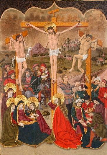 La obra muestra a Jesucristo crucificado entre dos ladrones.